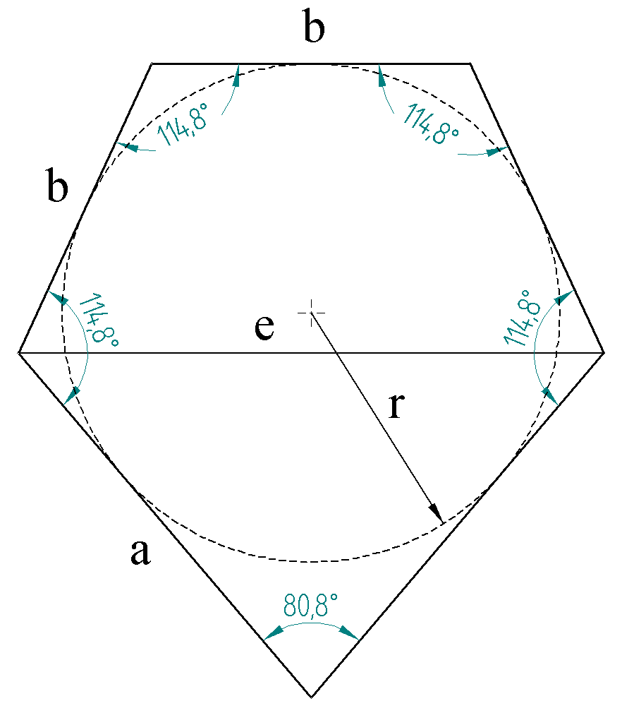 Größen im Fünfeck des Pentagonikositetraeders